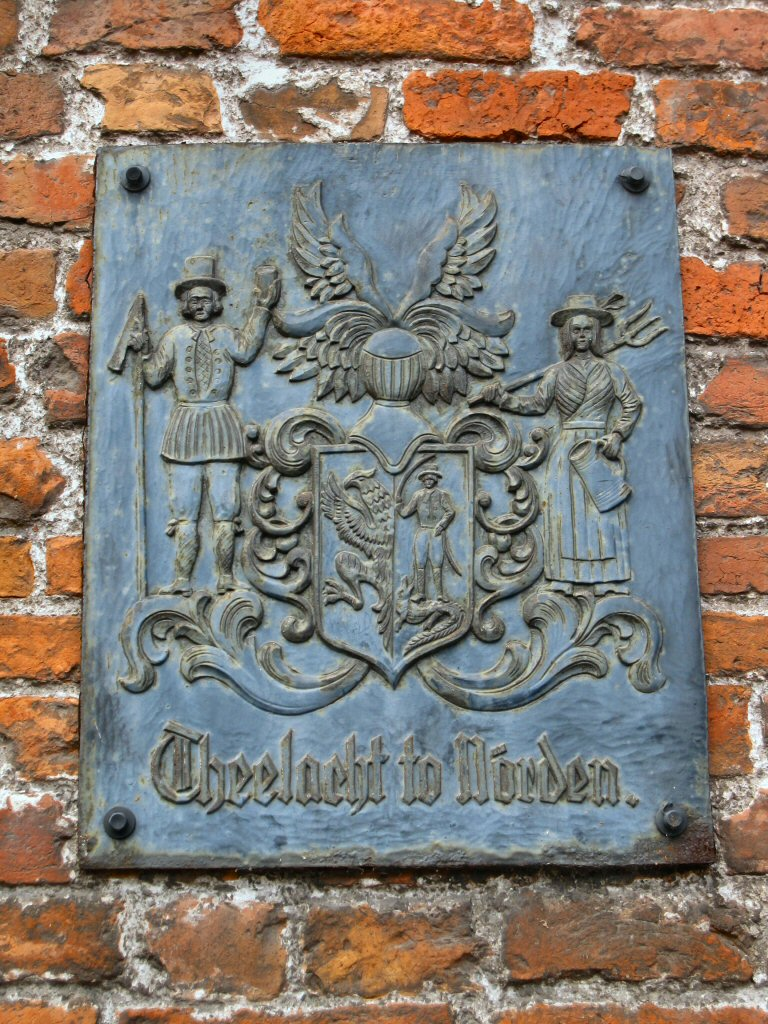 Tafel „Theelacht to Nörden“ am alten Rathaus der Stadt Norden (Ostfriesland)